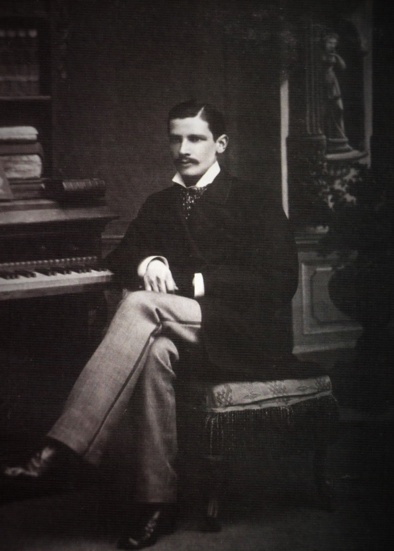 Петр Аркадьевич Столыпин (1862-1911) - студент естественного отделения физико-мат. факультета.